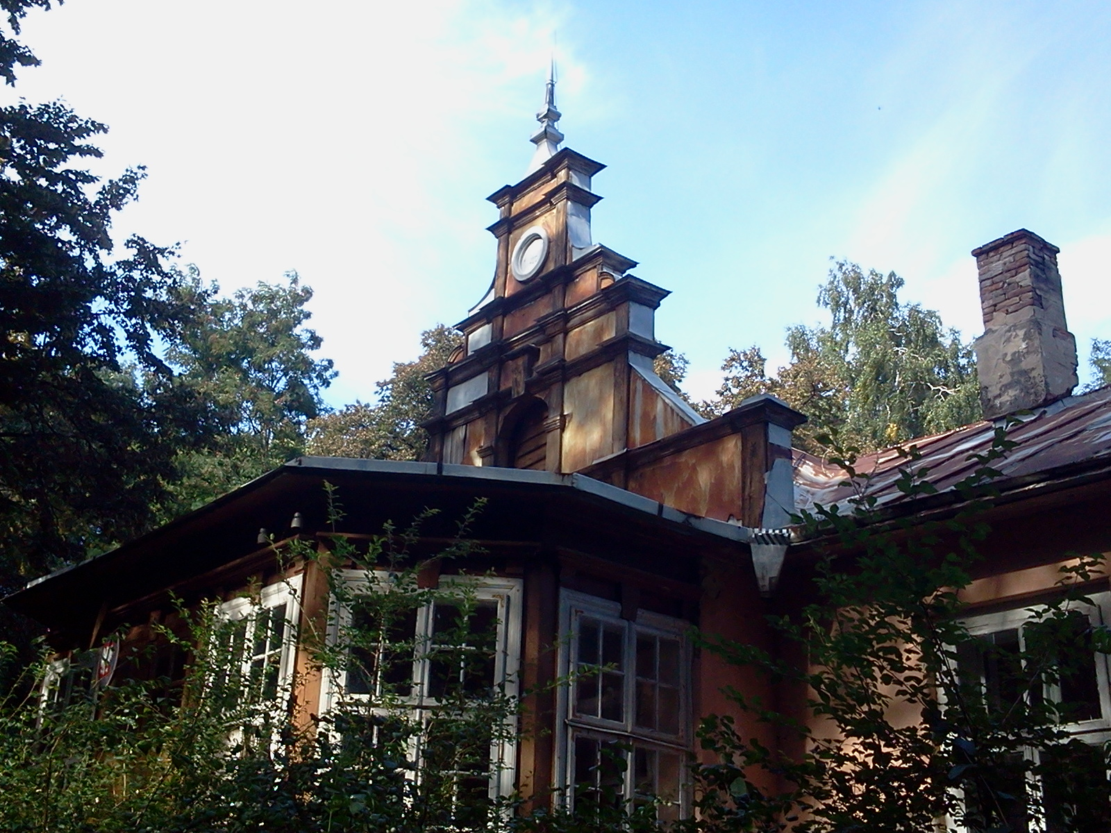 Białowody - zespół dworski, 1894, 1912